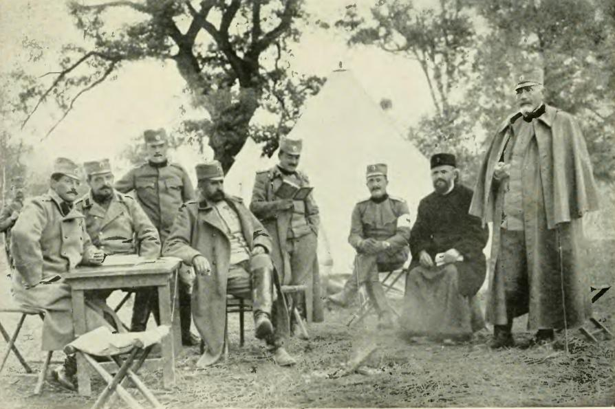 Oficiales serbios del segundo regimiento durante la Primera Guerra Mundial